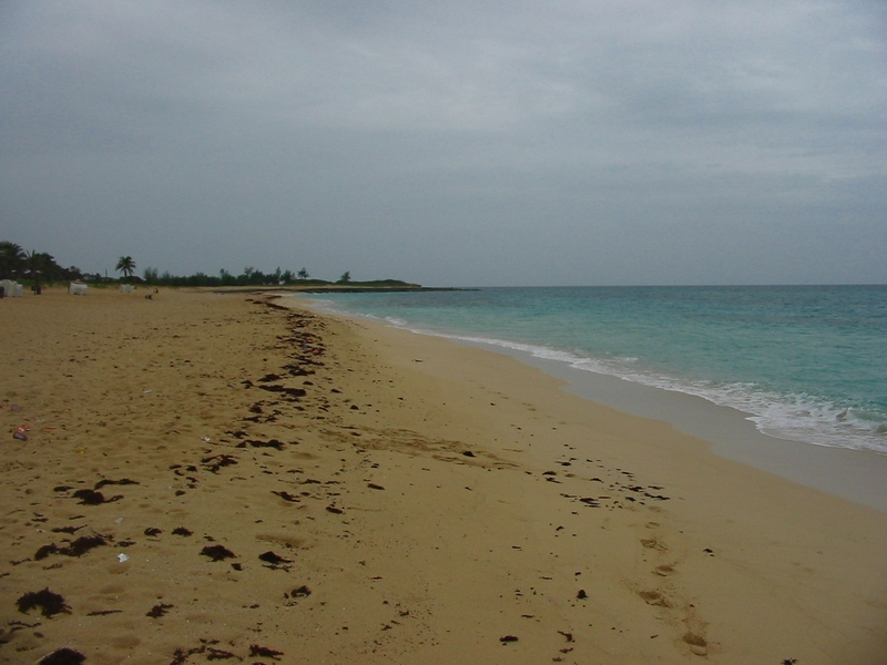 Tarara, Cuba